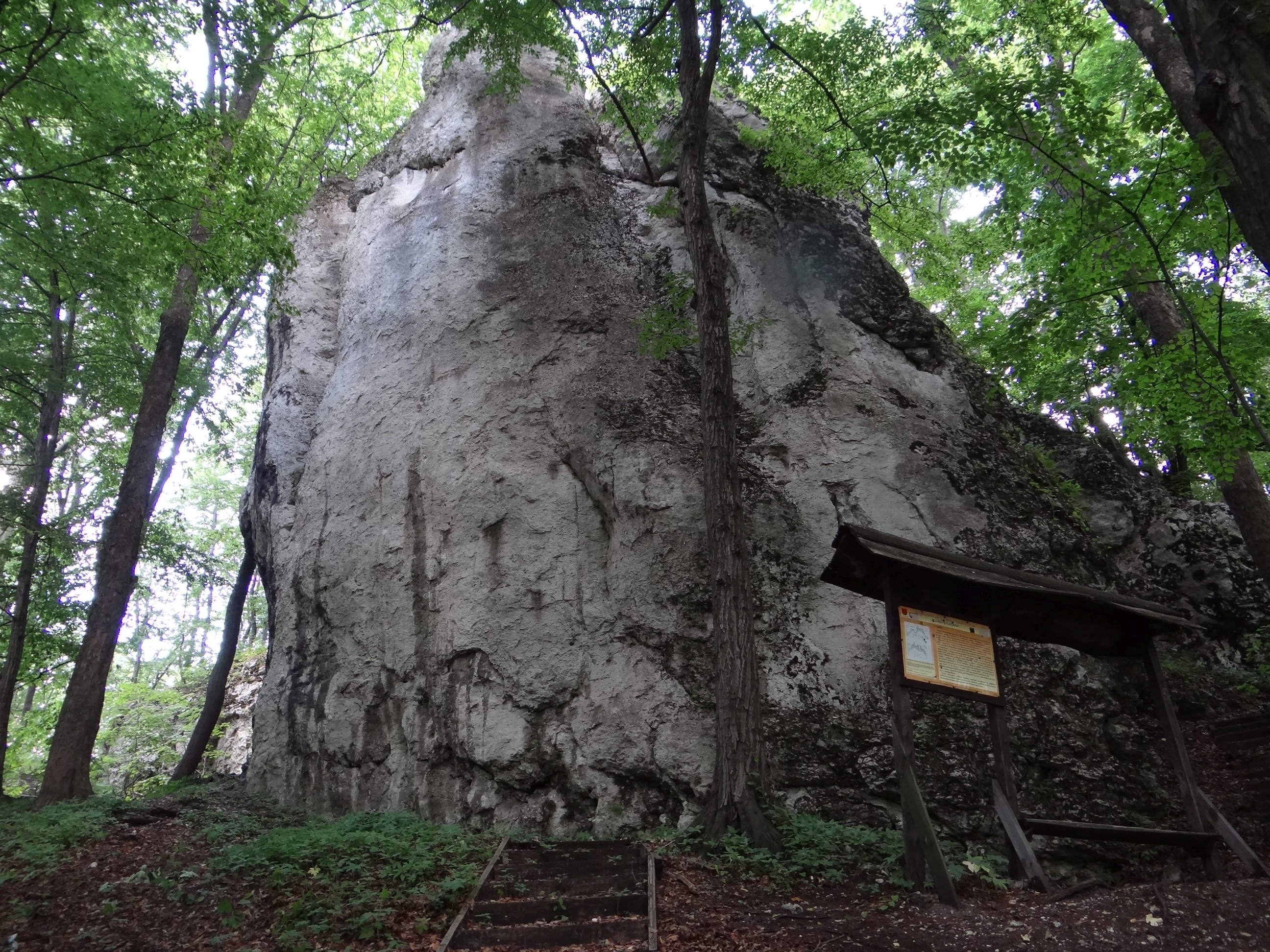 Maniakówka